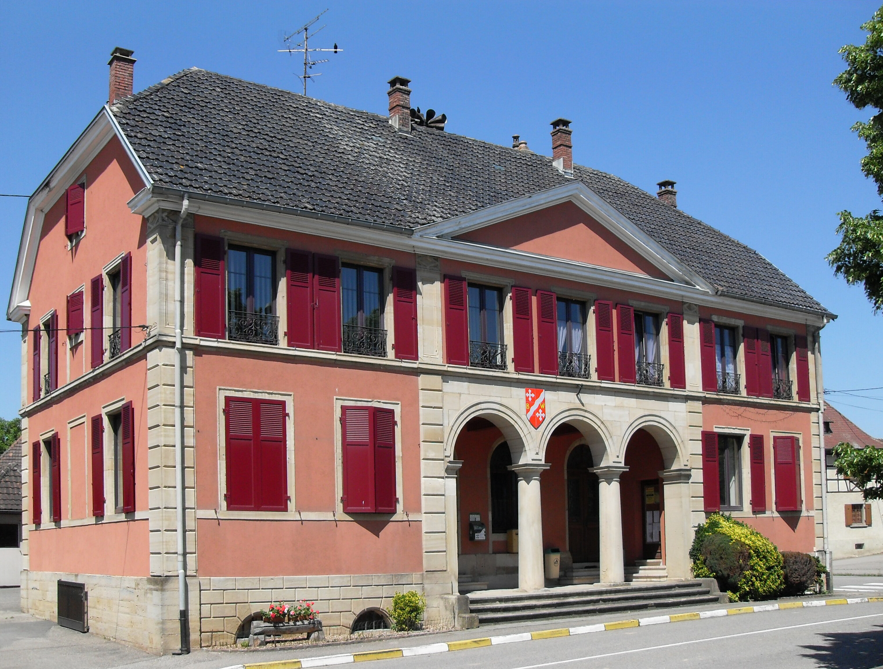 La mairie de Bernwiller